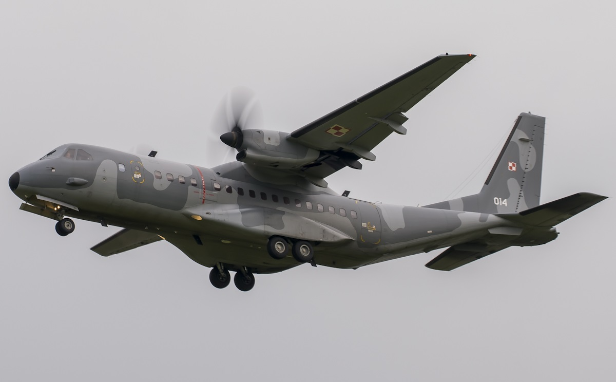 CASA C-295M - Siły Powietrzne